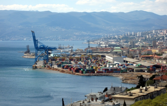 Luka Brajdica, Rijeka